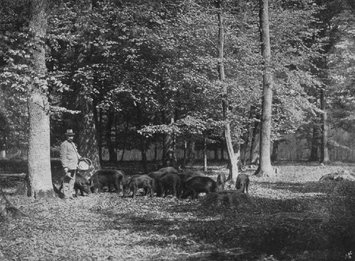 Originalbeschreibung „Saukörnung im Kleinen Deister bei Springe“. – Region Hannover, Niedersachsen, Deutschland.